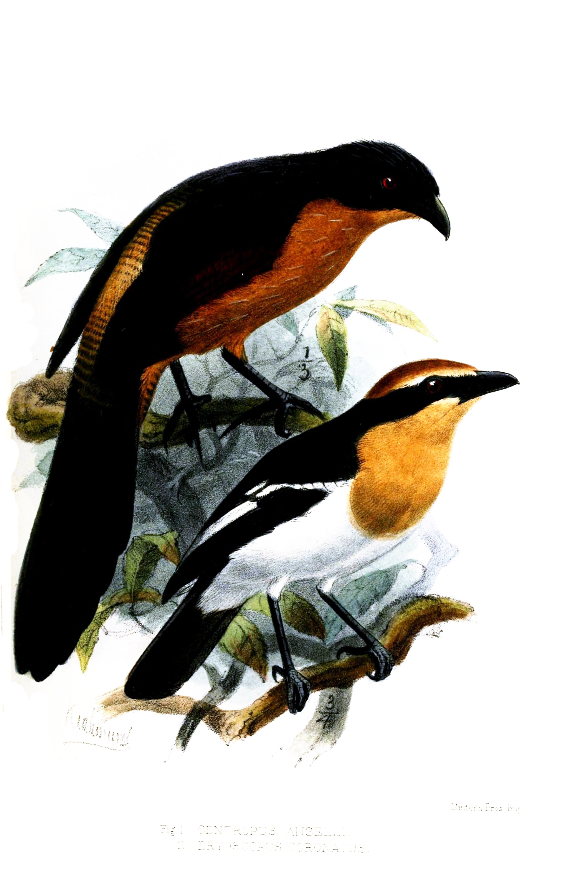 Centropus anselli Dryoscopus coronatus =